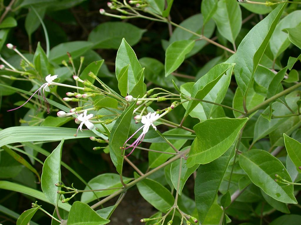 Clerodendrum inerme：イボタクサギ 2004/08/11 沖縄本島北部：Okinawa Island, Japan